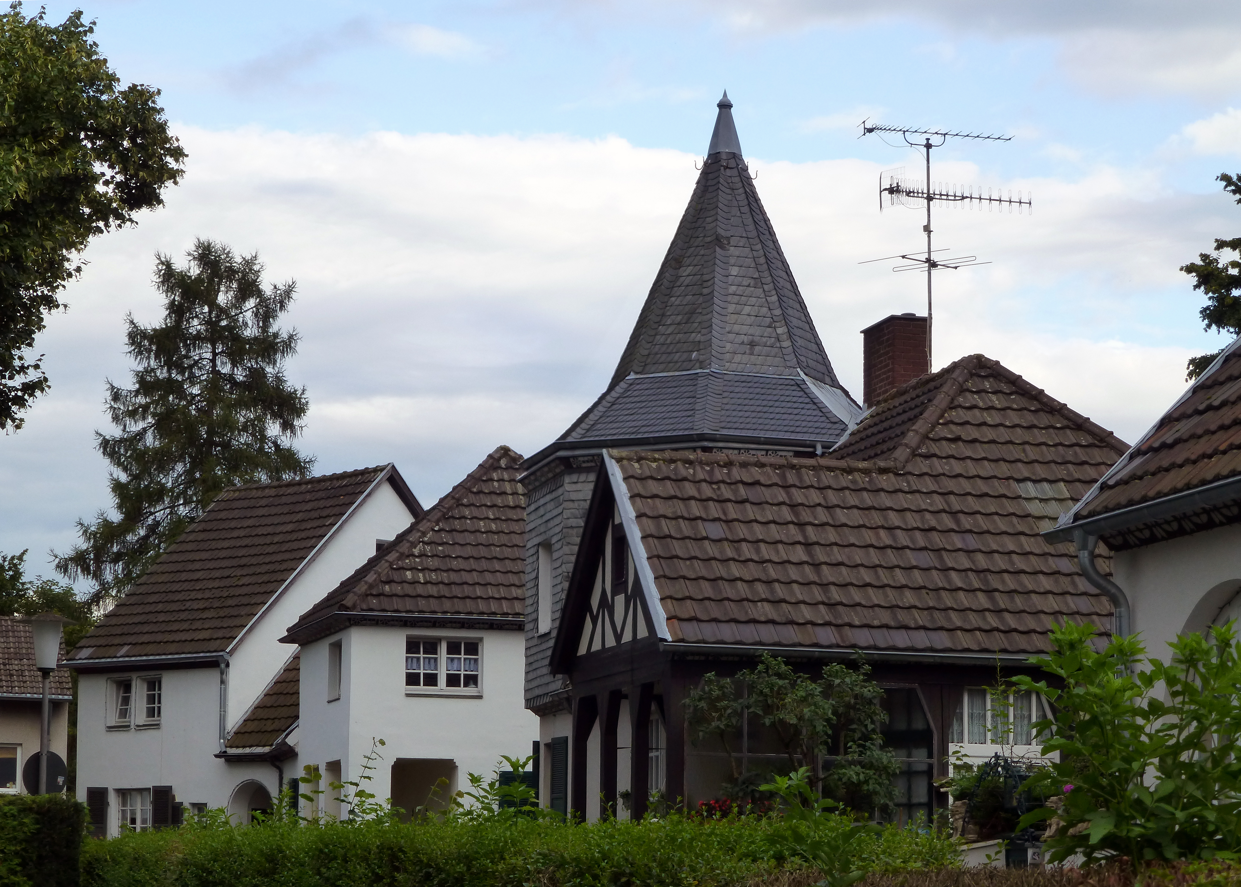 Siedlung Pallenbergheim (Köln-Weidenpesch), Jakob Pallenbergs Arbeiterheim This is a photograph of an architectural monument.